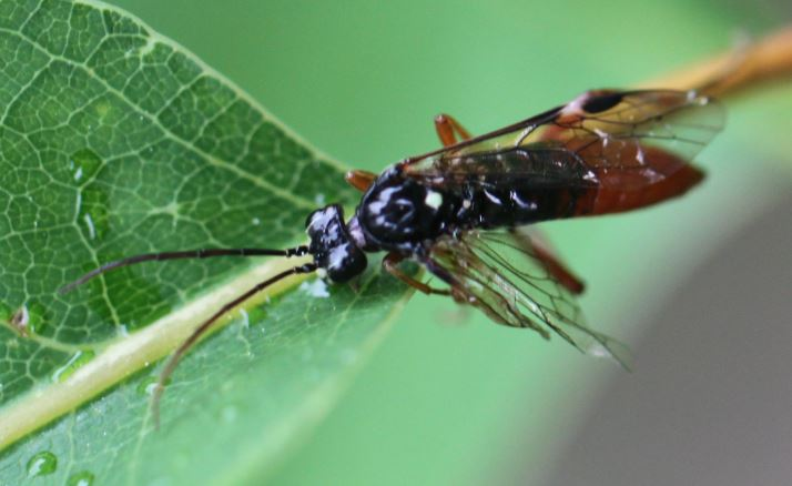 Tenthredopsis cf. litterata, Weibchen, am 27. Mai 2019 in der Schwetzinger Hardt